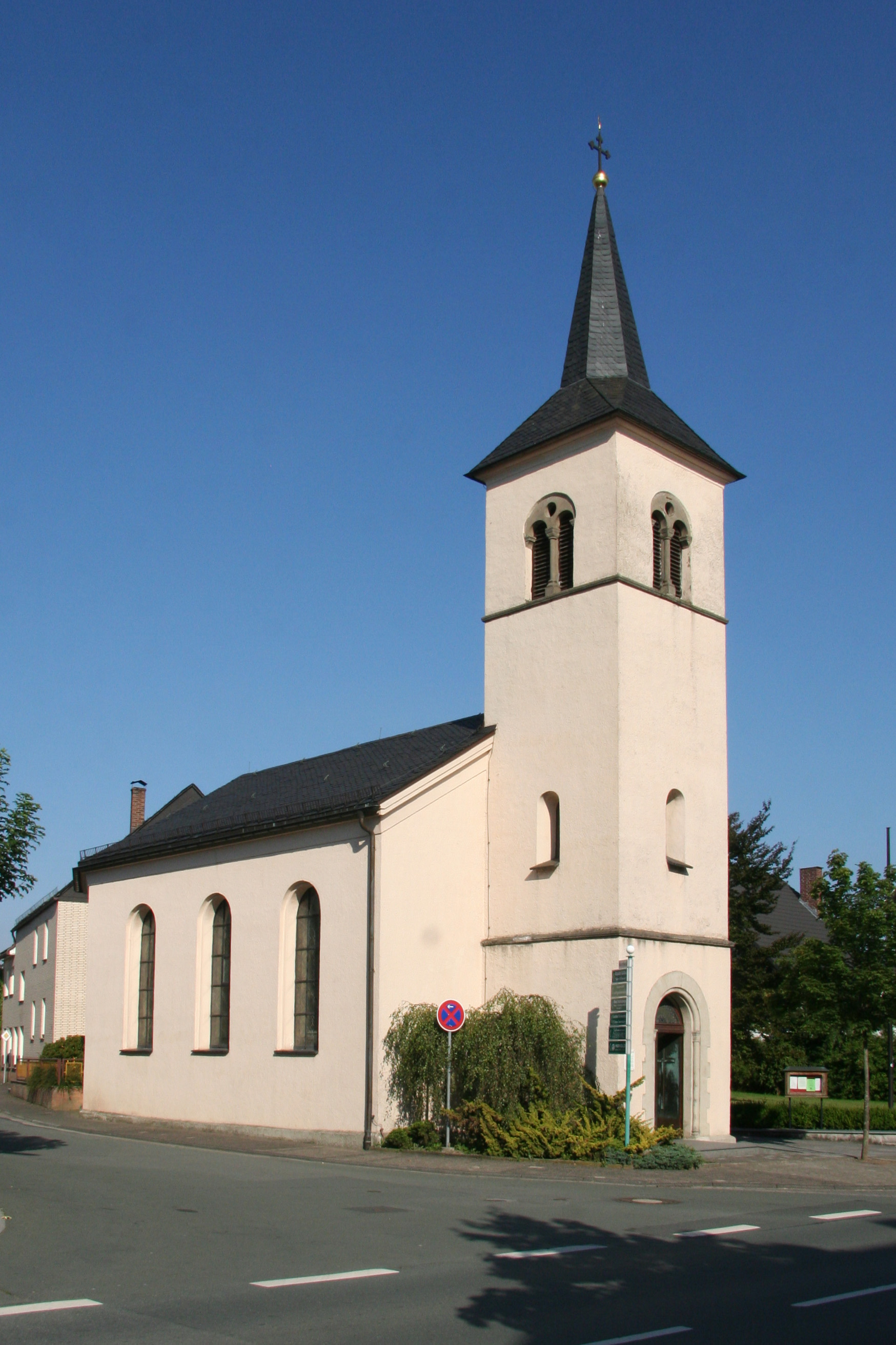 Evangelische Kirche in Medebach - Ansicht von Südwesten This image shows a heritage building in Germany, located in the North Rhine-Westphalian city Medebach (no. 12).